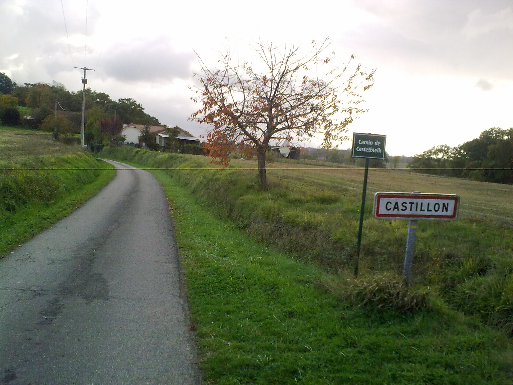 Castillon (Canton d'Arthez-de-Béarn)